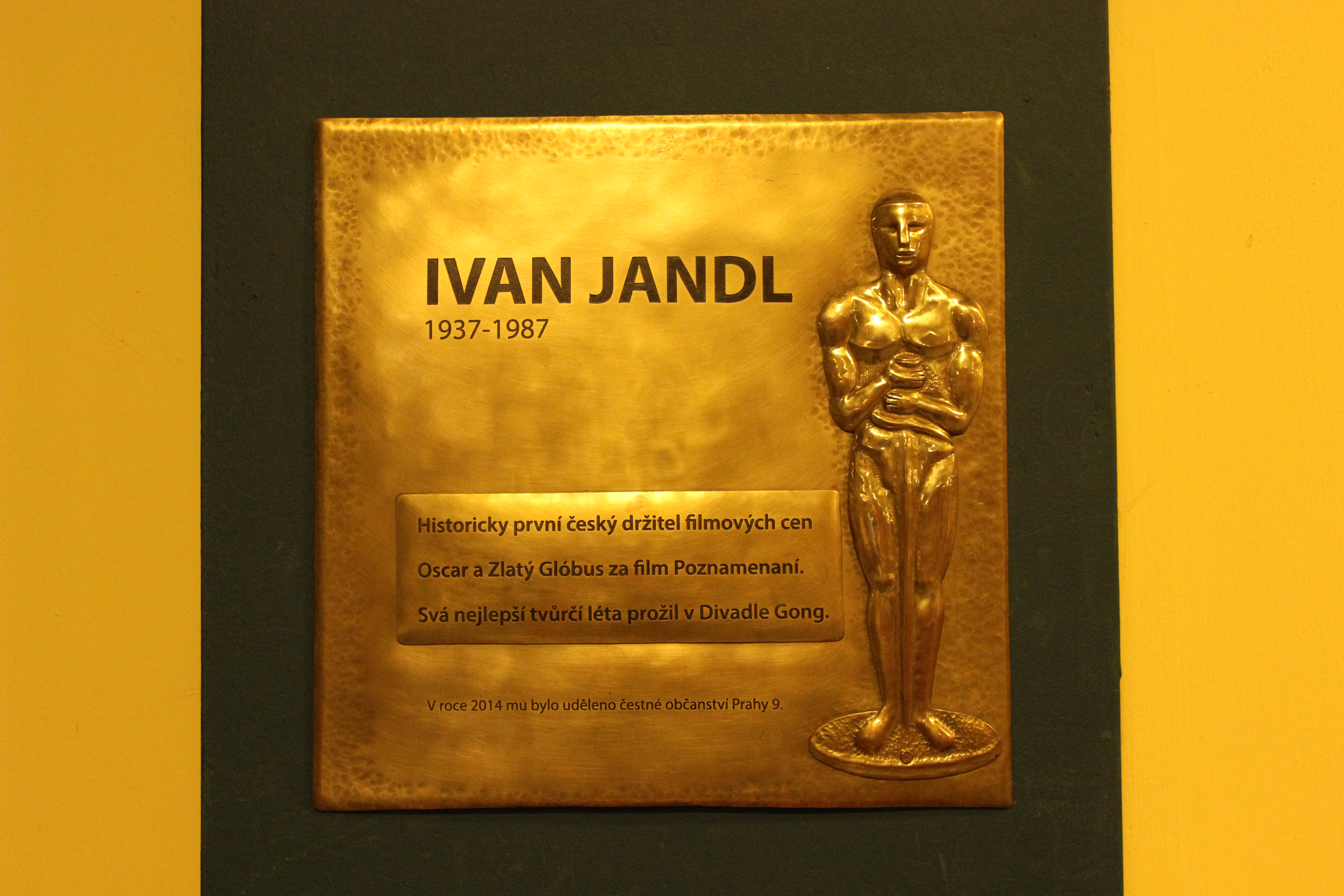 Pamětní deska připomínající Ivana Jandla osazená ve foyer pražského divadla Gong.